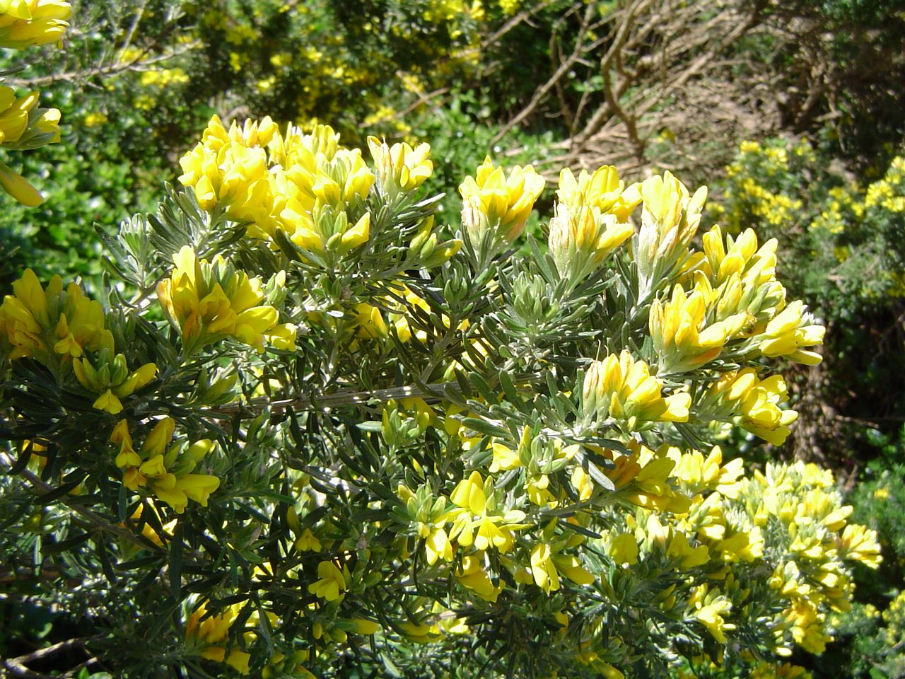 Genista linifolia (Syn: Teline linifolia), Ceuta, NW de África, España